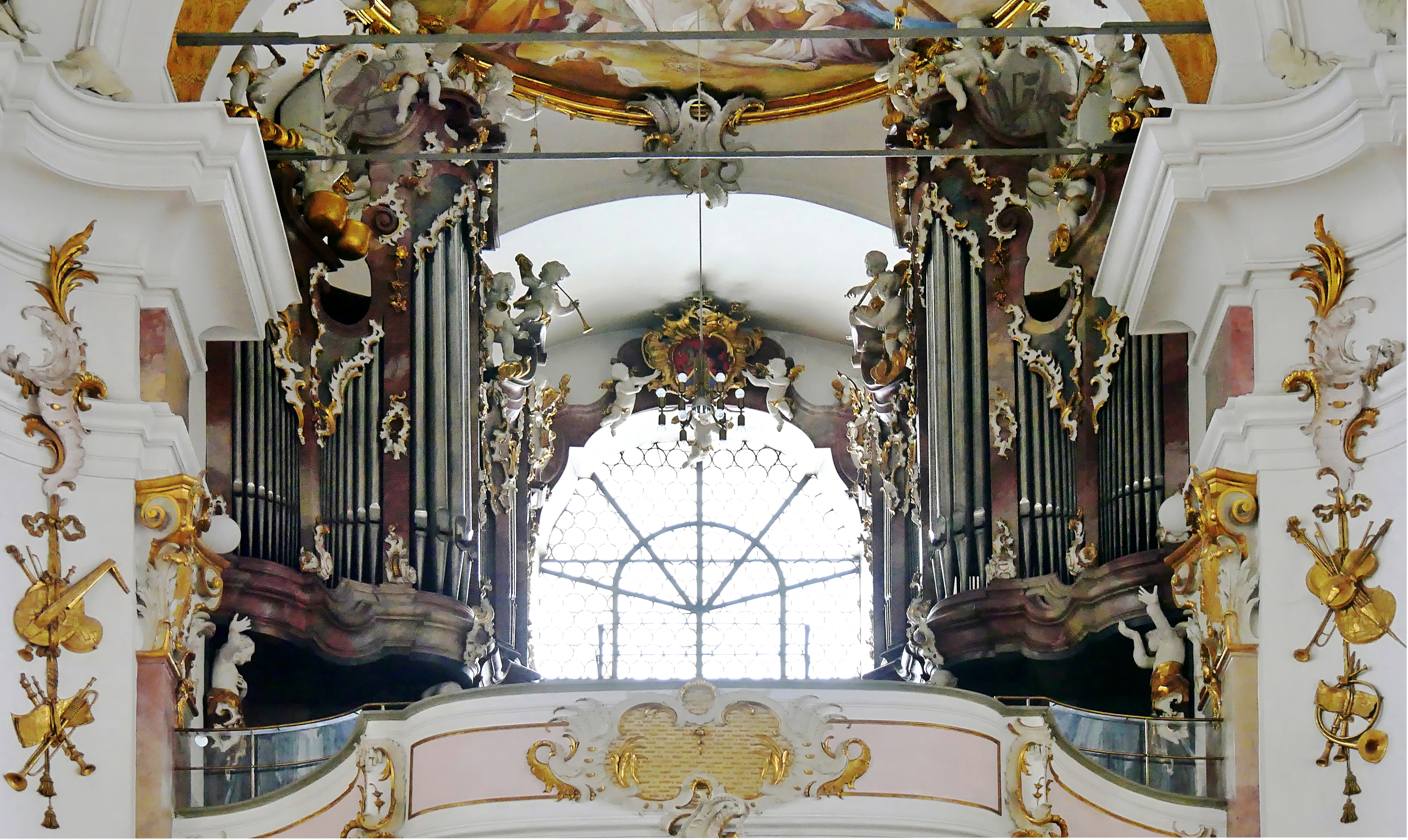 Orgel der Wallfahrtskirche Maria Steinbach